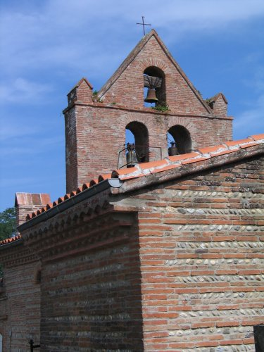 Clocher-mur de l'église Saint-Lizier.